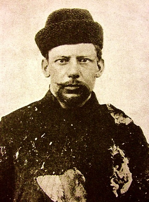 Русский революционер, террорист Иван Платонович Каляев (1877-1905)